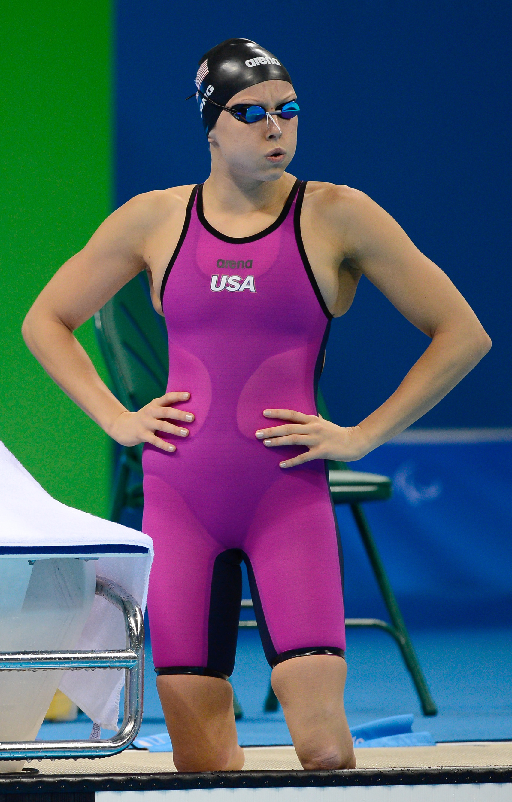 Rio de Janeiro - Jessica Long , dos Estados Unidosl, medalha de prata nos 400m nado livre S8 nos Jogos Paralímpicos Rio 2016, no Estádio Aquático. (Fernando Frazão/Agência Brasil)